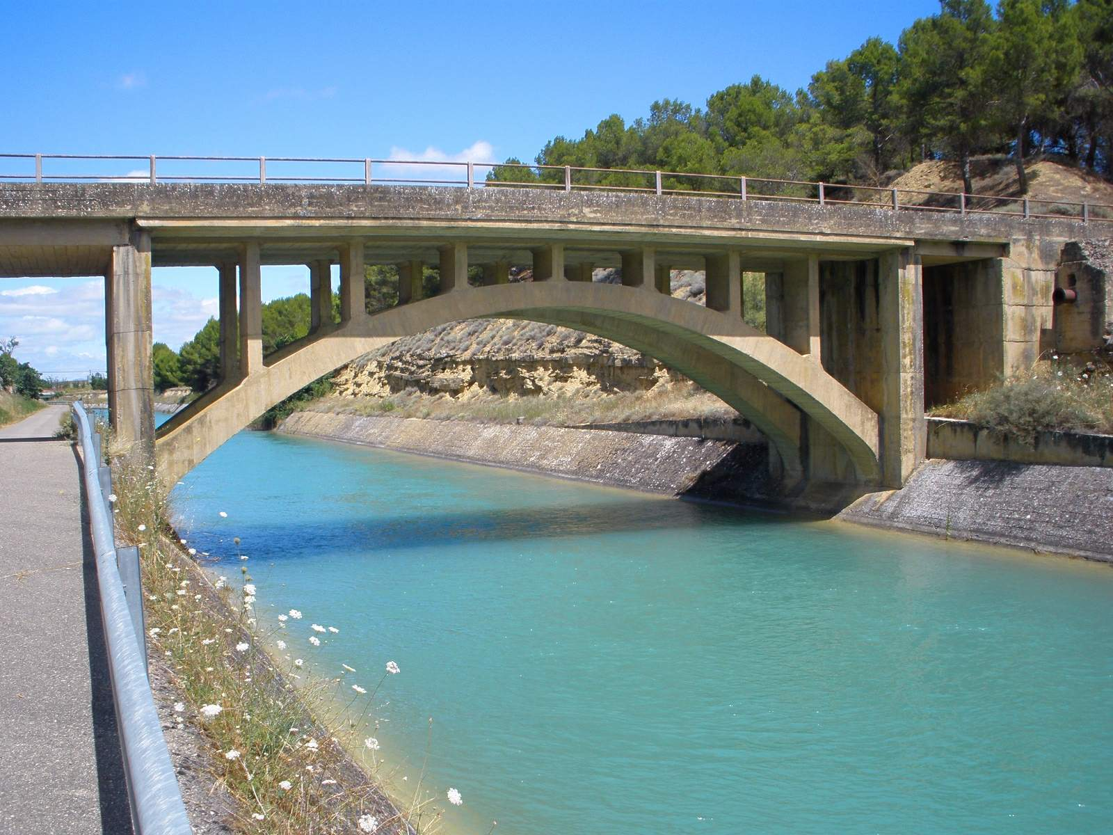 Canal de Bardenas, en las cercanías de Sádaba (Zaragoza, Aragón, España)